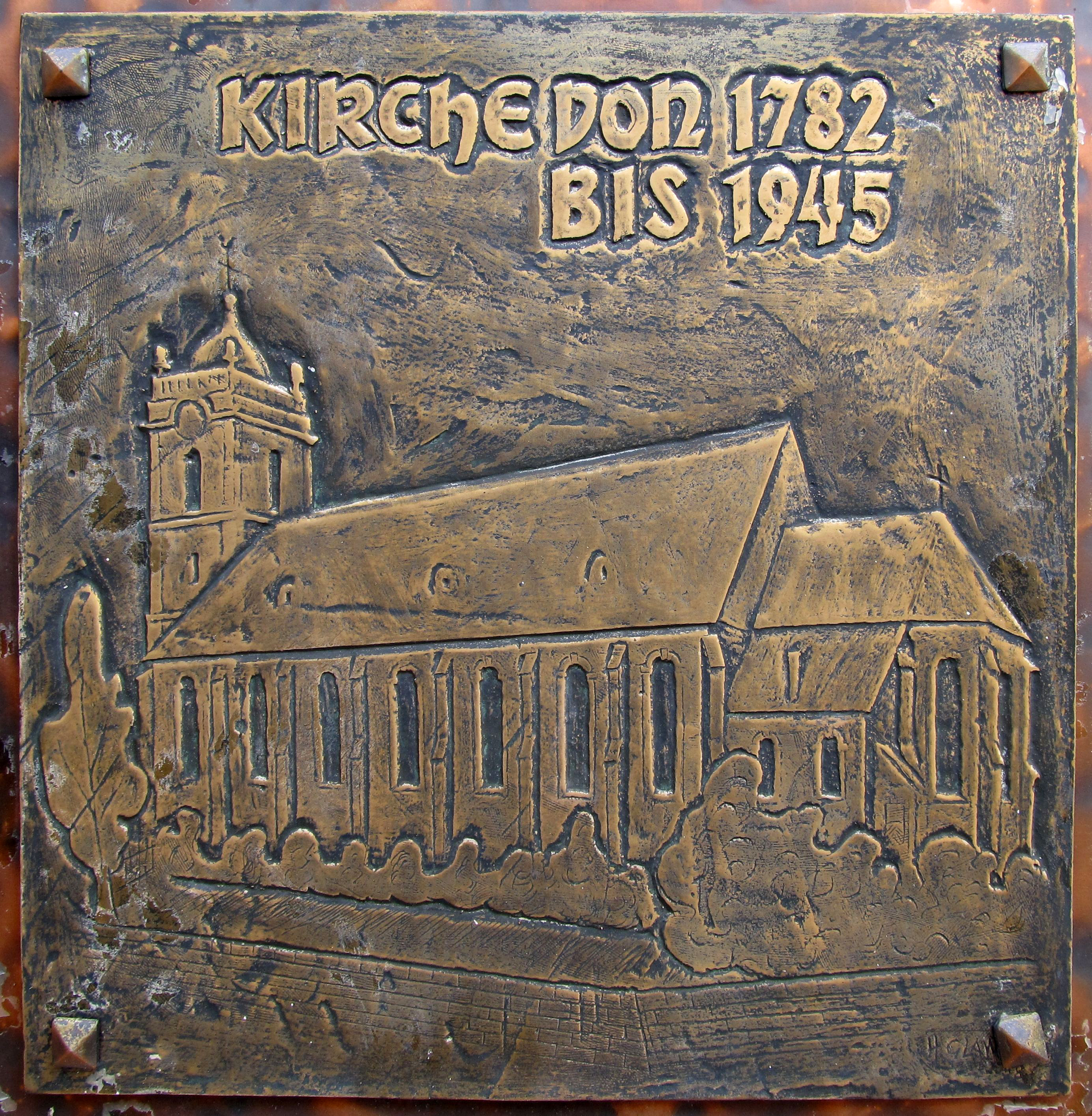 Bronzeplatte des sogenannten „sprechenden Portals" der katholischen Pfarrkirche St. Peter und Paul in Losheim, Gemeinde Losheim am See, Landkreis Merzig-Wadern, Saarland